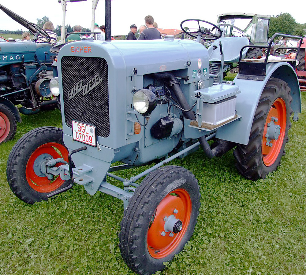 Quelle: selbst fotografiert, 08/2006 Fotograf: Späth Chr.